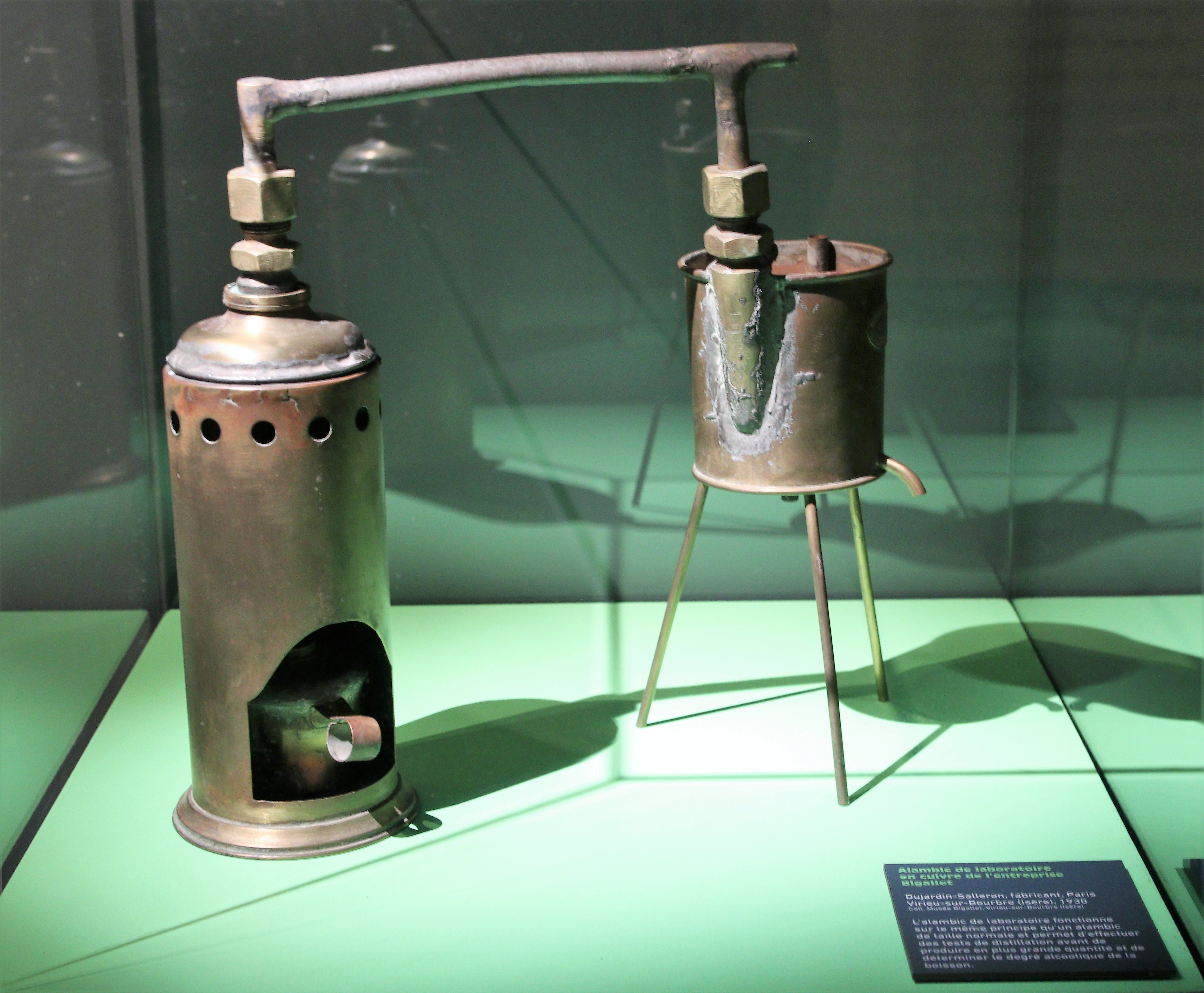 Alambic de laboratoire en cuivre de l'entreprise Bigallet ; Dujardin-Sailleron, fabricant, Paris ; Virieu-sur-Bourbe, 1930, Coll. Musée Bigallet (Virieu-sur-Bourbe, Isère). Exposition temporaire "L'ivresse des sommets" au Musée dauphinois, Grenoble.